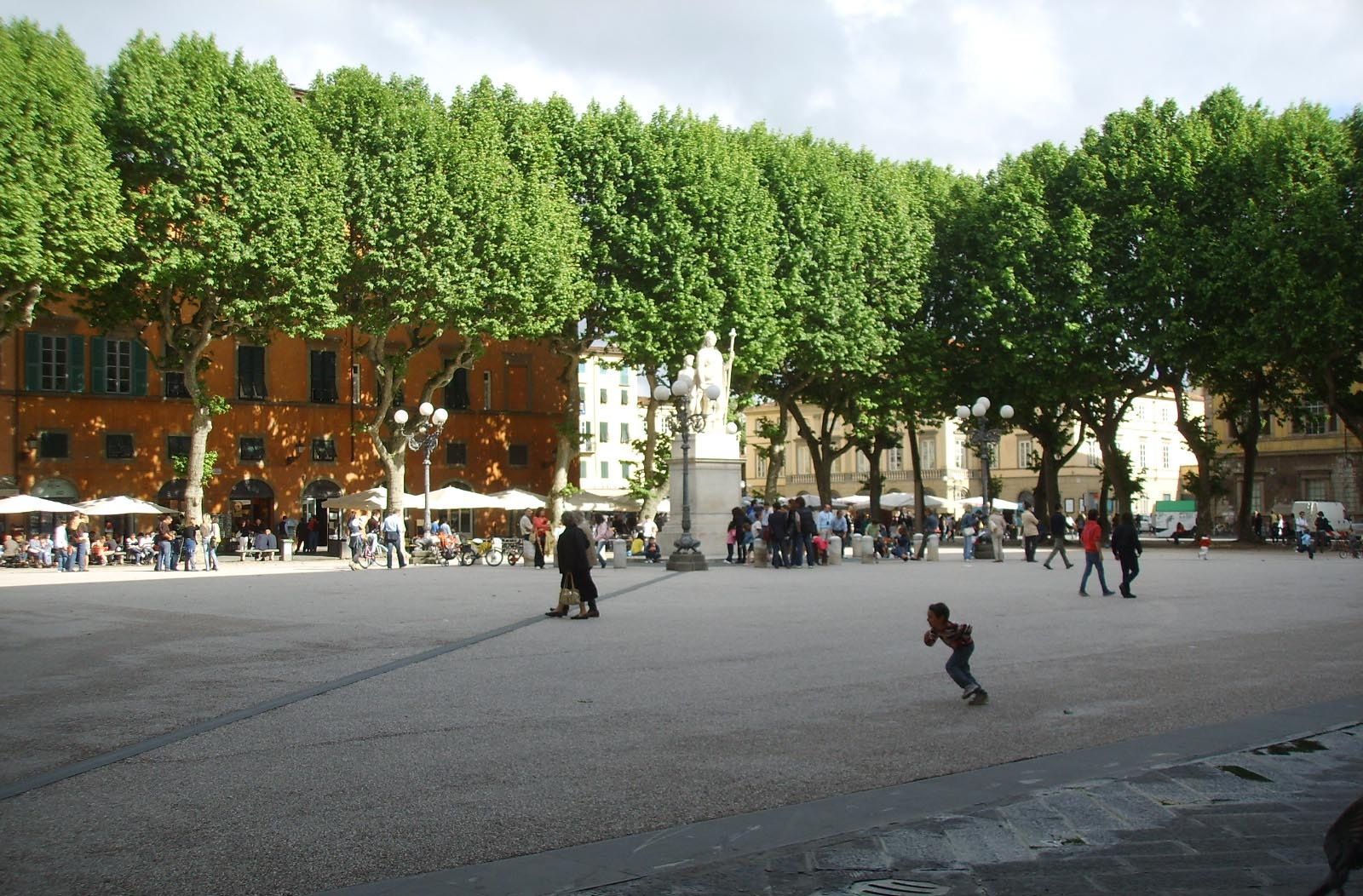 Lucca, piazza napoleone 3